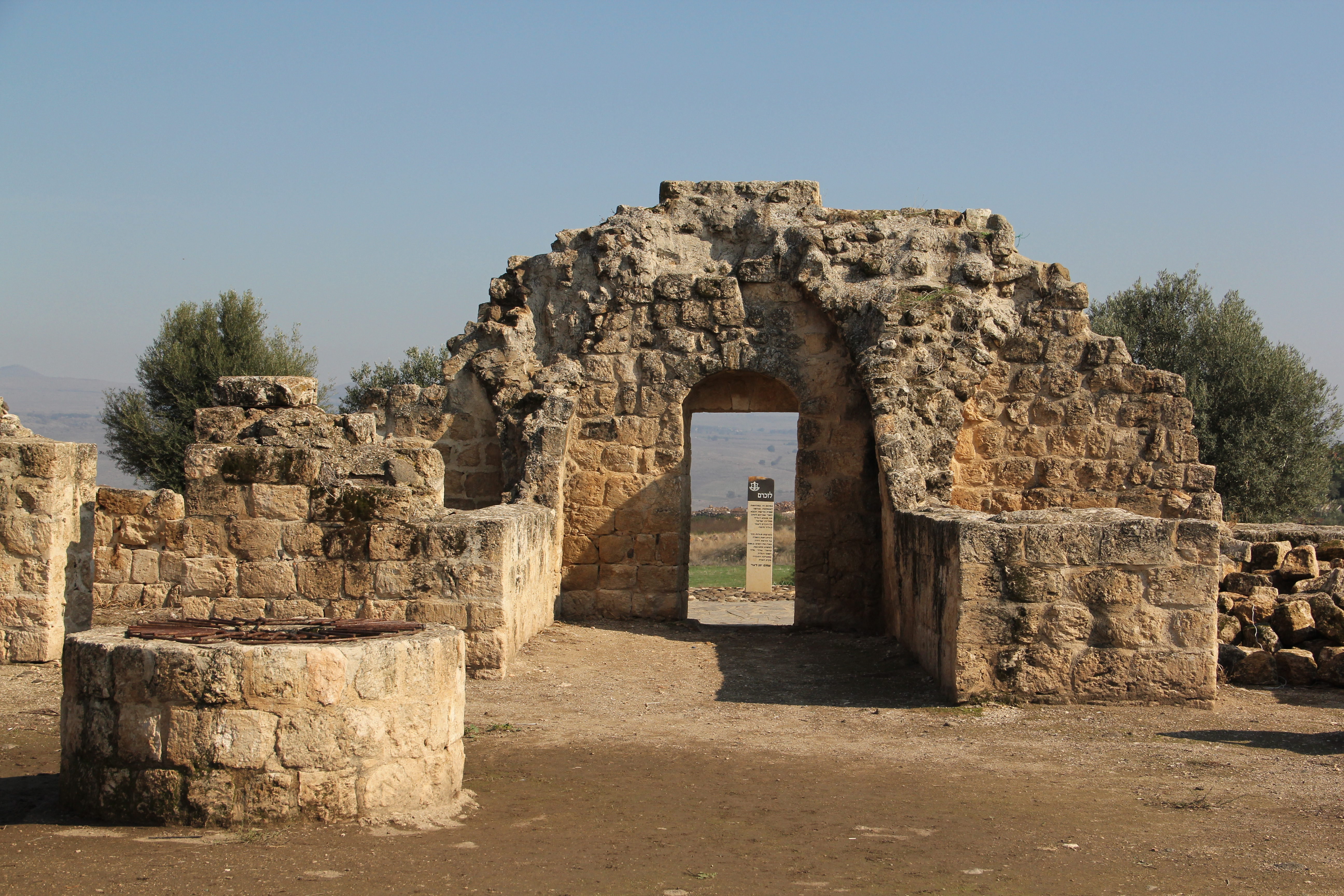 חירבת ירדה היא אתר ארכאולוגי ואתר הנצחה על שלוחה של רמת כורזים, סמוך למושב משמר הירדן. במקום היה בית אחוזה שנבנה בסוף המאה ה-19, ונחשפו בו ממצאים ארכאולוגיים בצורת חרסים ומטבעות שזמנם החל מהתקופה הרומית המאוחרת בארץ ישראל ועד התקופה הממלוכית והתקופה הערבית הקדומה. האחוזה ואדמותיה נרכשו על ידי קק"ל בשנת 1936.